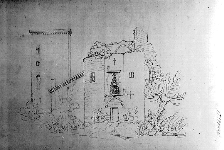 L'ancien château-fort de Lesparre (partiellement détruit au XIXe siècle)